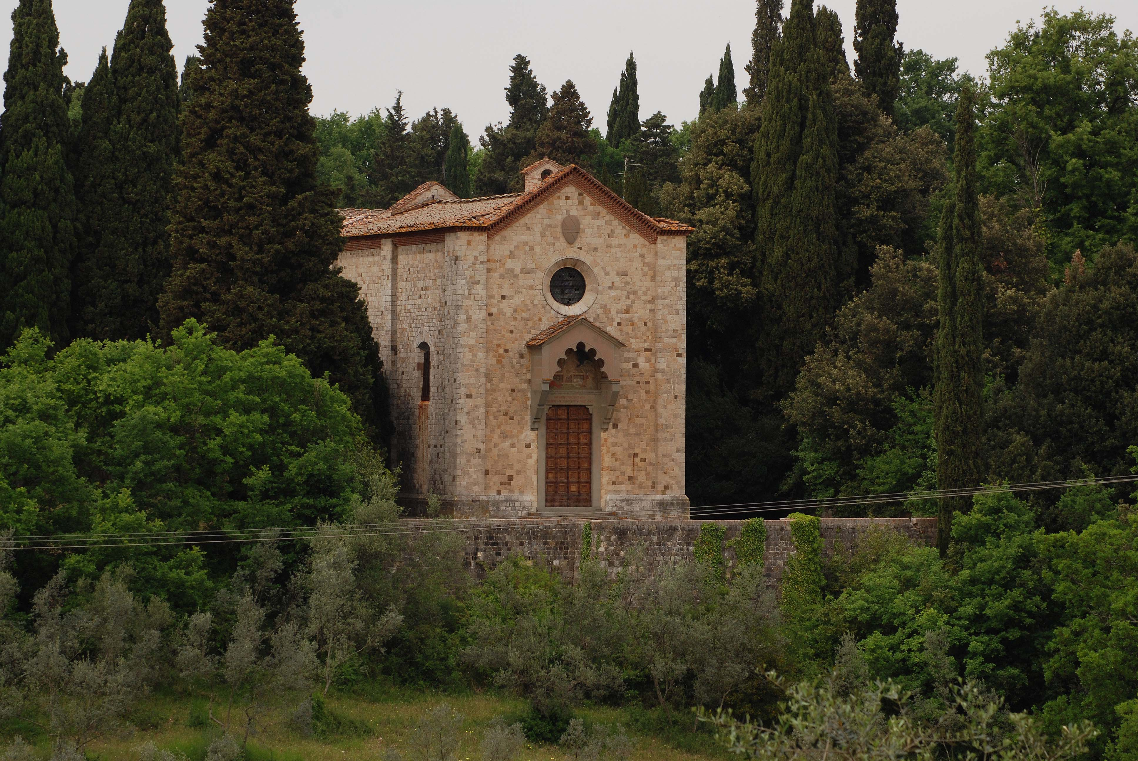 Cappella gentilizia della famiglia Corsini,posta nel parco di Villa Le Corti a San Casciano in Val di Pesa